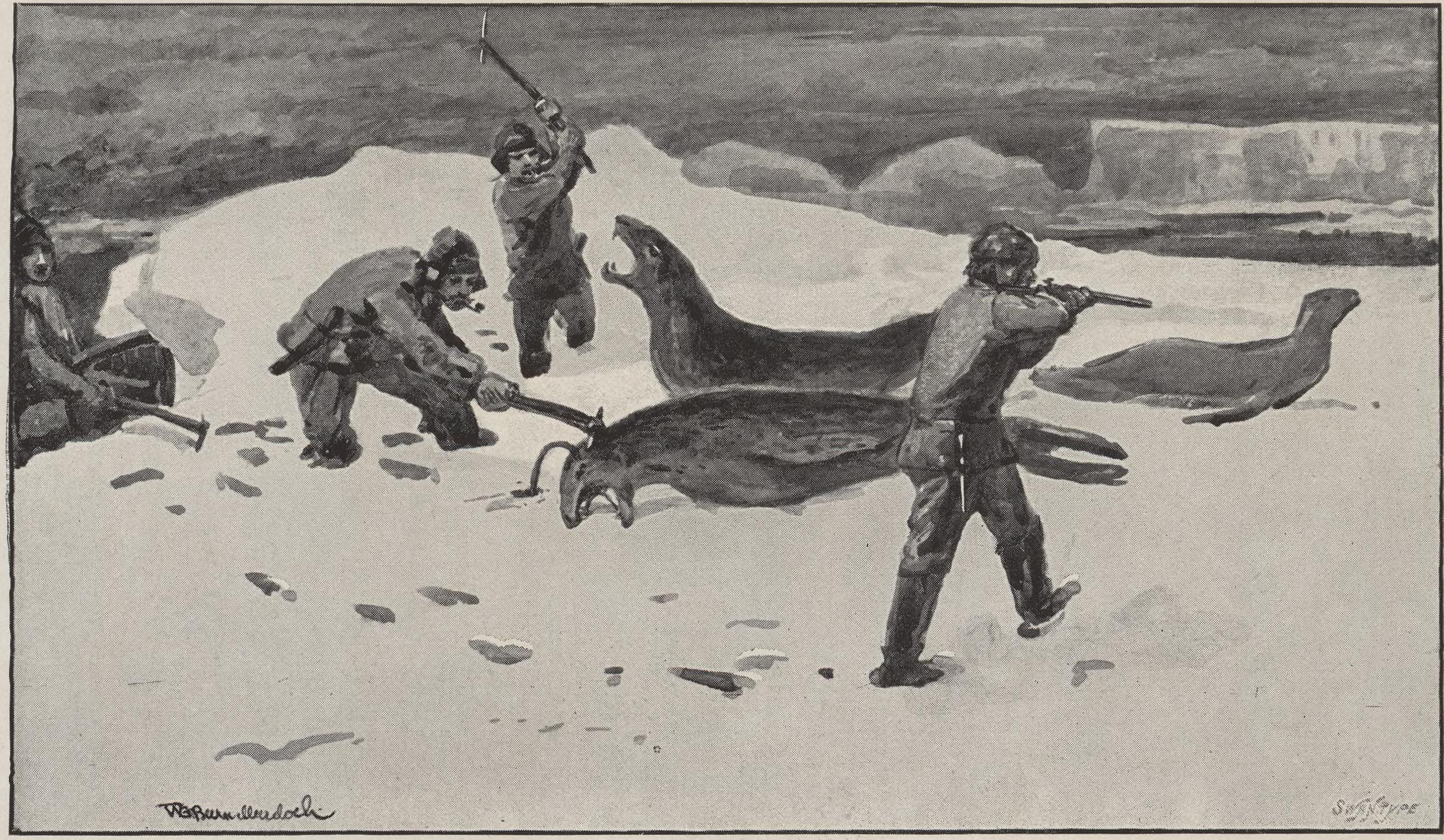 Illustrasjon hentet fra boken "The cruise of the "Antarctic" to the South Polar regions" av Bull, H.J. og utgitt av E. Arnold (London, 1896)